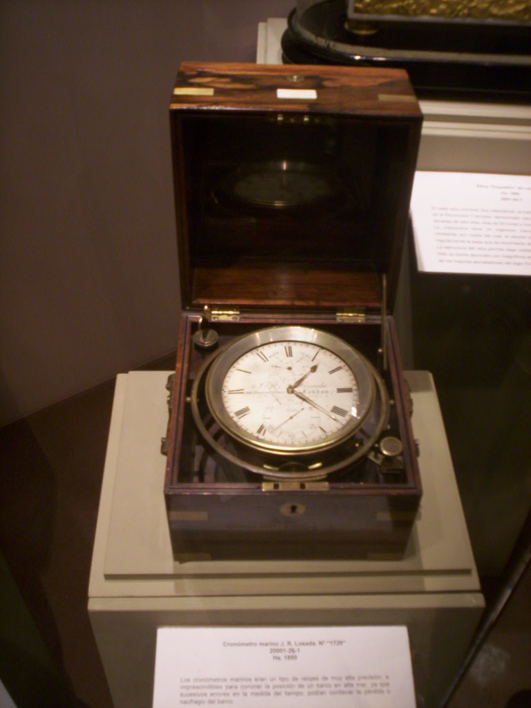 "J. R. Losada fabricó dos modelos de cronómetros marinos con una autonomía de marcha de 56 horas y otro de 8 días, llegando a servir 70 unidades a la marina militar española. A esta serie pertenece el cronómetro aquí expuesto" Datado entre 1850 y 1860. Museo Nacional de Ciencia y Tecnología (Estación de Delicias, Madrid) pieza 2001/26/1 del catálogo.